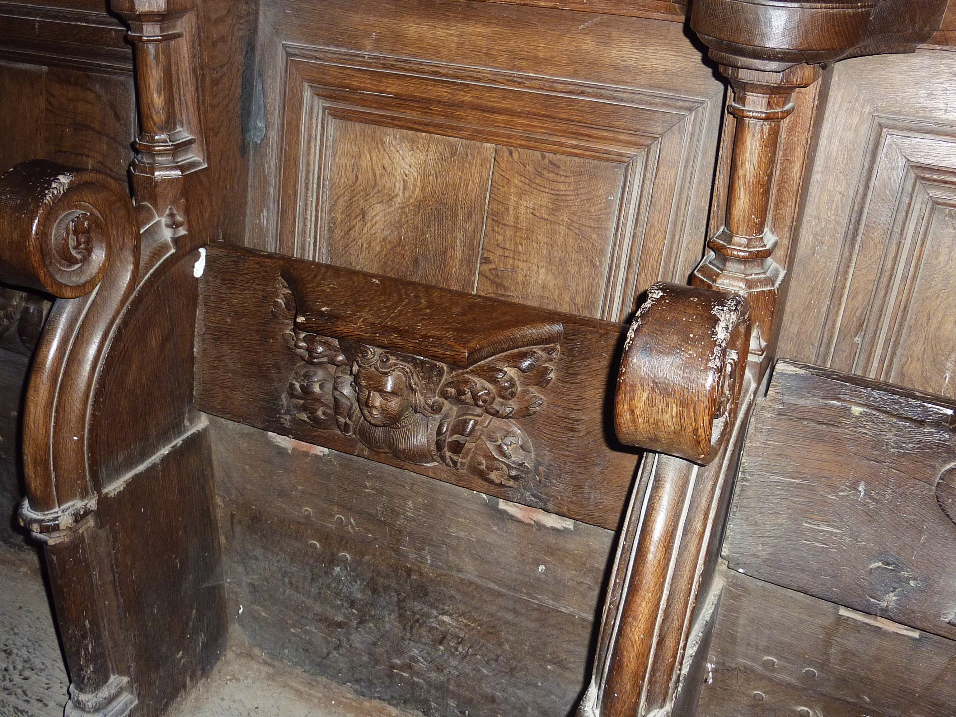 Saint-Herbot (Plonévez-du-Faou): église Saint-herbot, stalle avec miséricorde sculptée